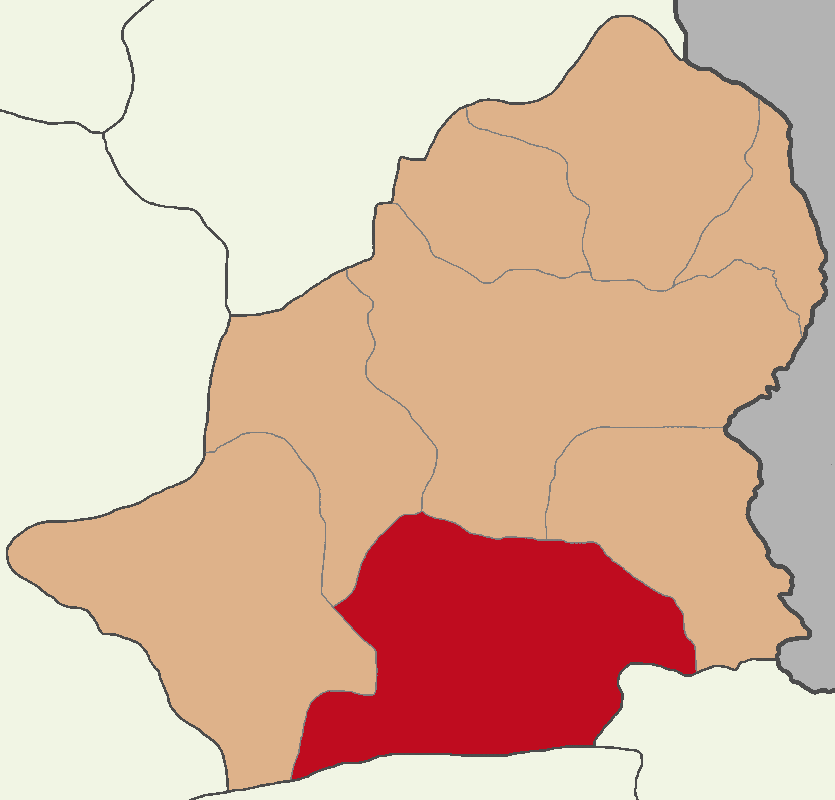 Kağızman ilçesinin konumu